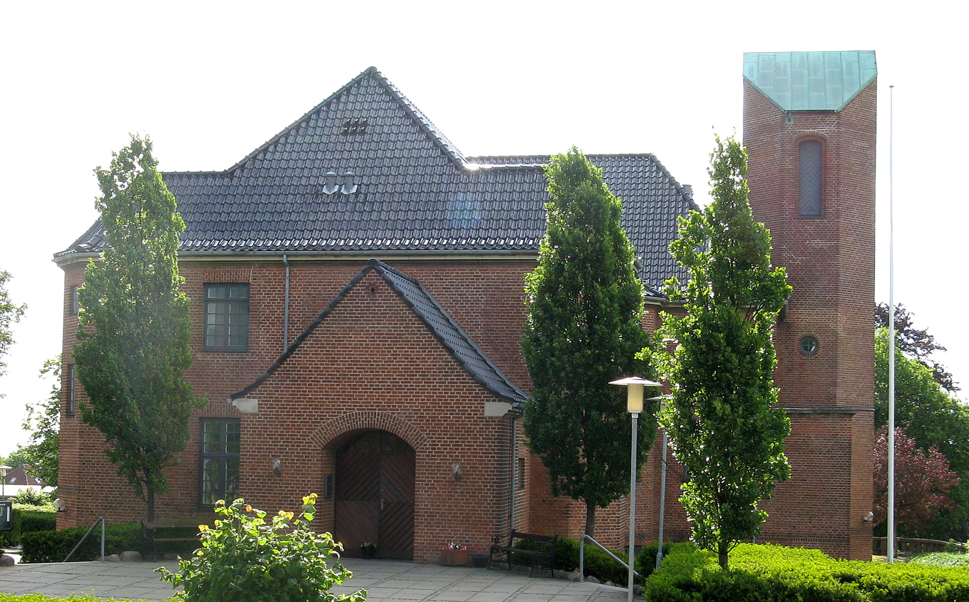 Risskov Kirke set fra vest